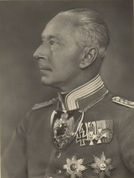 Wilhelm von Preußen (1882–1951), Brustporträt in Kürassieruniform, Studioportrait, 15 x 11 cm. Als Postkarte gelaufen 21. Mai 1937. Aufnahme: F. Langhammer Kassel.